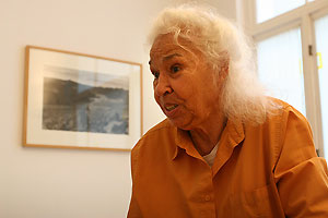 Nawal El Saadawi, Brussels, Belgium